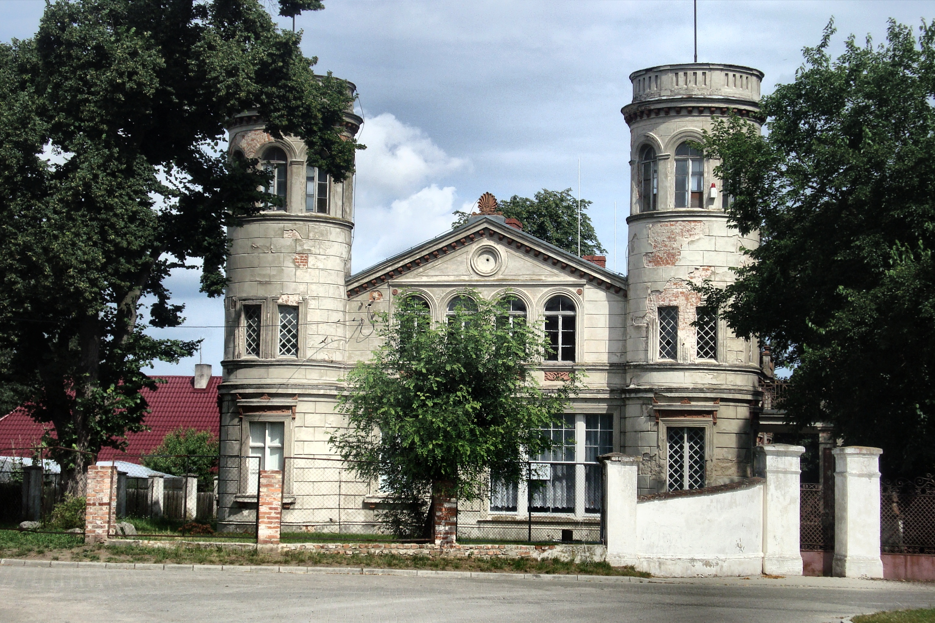 Lgiń, dwór, 1 poł. XIX